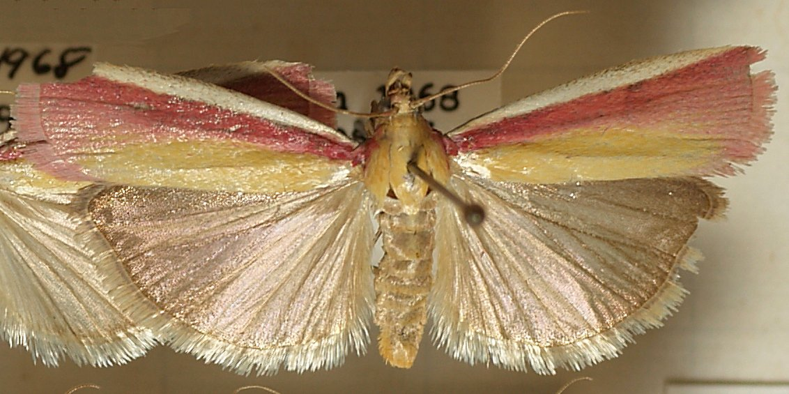 Oncocera semirubella